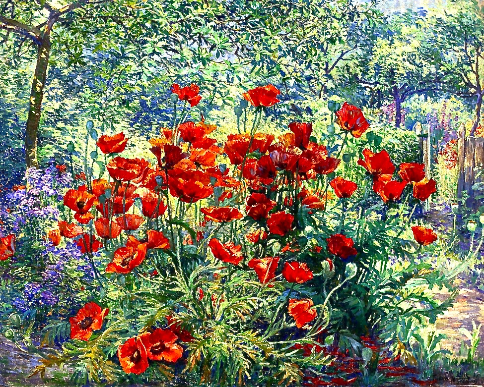 Juliette Wytsman: Le jardin fleuri (81.3 x 100.3 cm), Öl auf Leinen